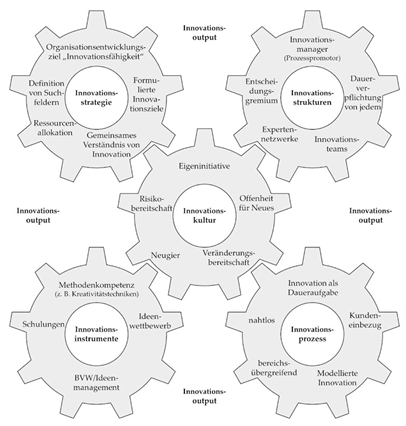 Das Innovationssystem beinhaltet die verschiedenen Bestandteile und Abläufe, die innerhalb einer Organisation zu berücksichtigen sind. Unter übergreifender sytematischer Abstimmung trägt jeder Bereich zum optimalen Innovationsoutput bei. Durch wechselseitige Abhängigkeiten ensteht verstärkt ein internes Kommunikationsbedürfniss, um eine reibungslose Zusammenarbeit zu gewährleisten. Dabei ist es wichtig, nebst dem Innovationsprozess als solchen auch das gesamte Unternehmen und dessen Mitarbeiter auf einen kontinuierliche Innovationsprozess vorzubereiten. Alle Bereiche müssen auf die künftigen Veränderungen bzw. ihre Aufgabenbereiche sensibilisiert und ggf. geschult werden.